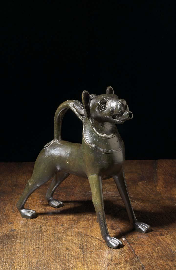 Exemple d'un aquamanile en bronze